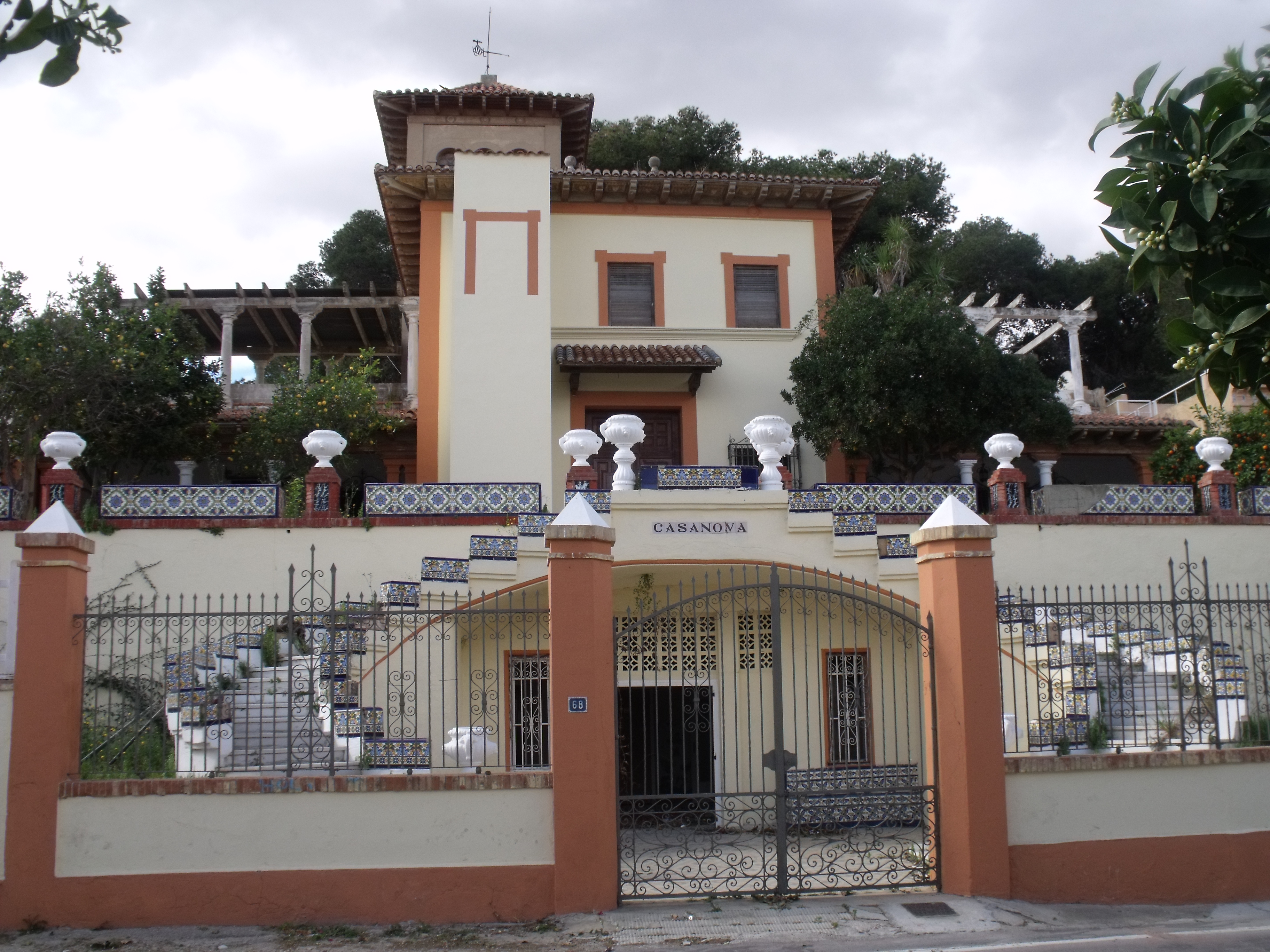 Chalet habilitado durante la guerra como hospital de las FARE.